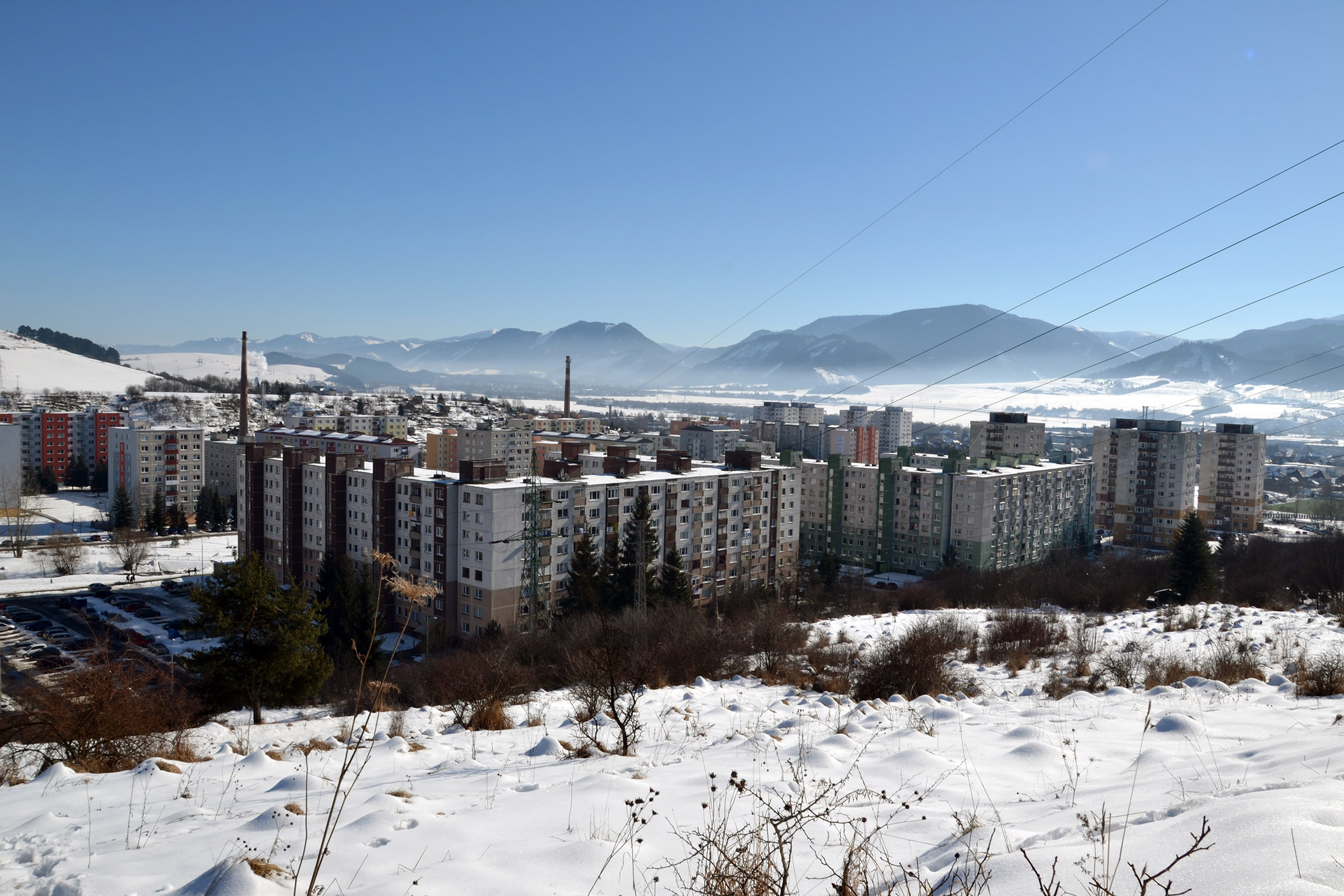 Výhľad na Podbreziny s Hája Nicovô